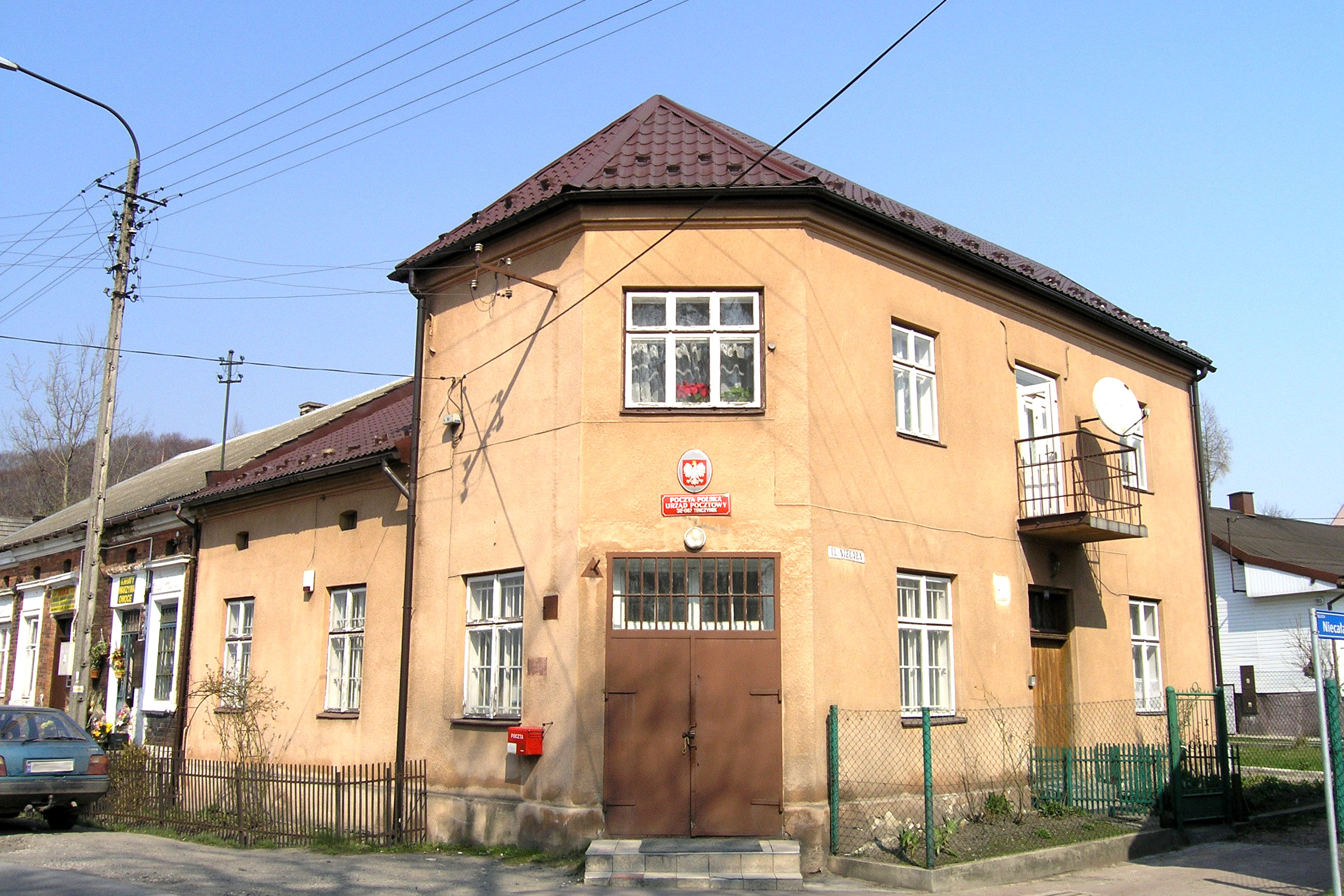 Budynek Poczty Polskiej w Tenczynku